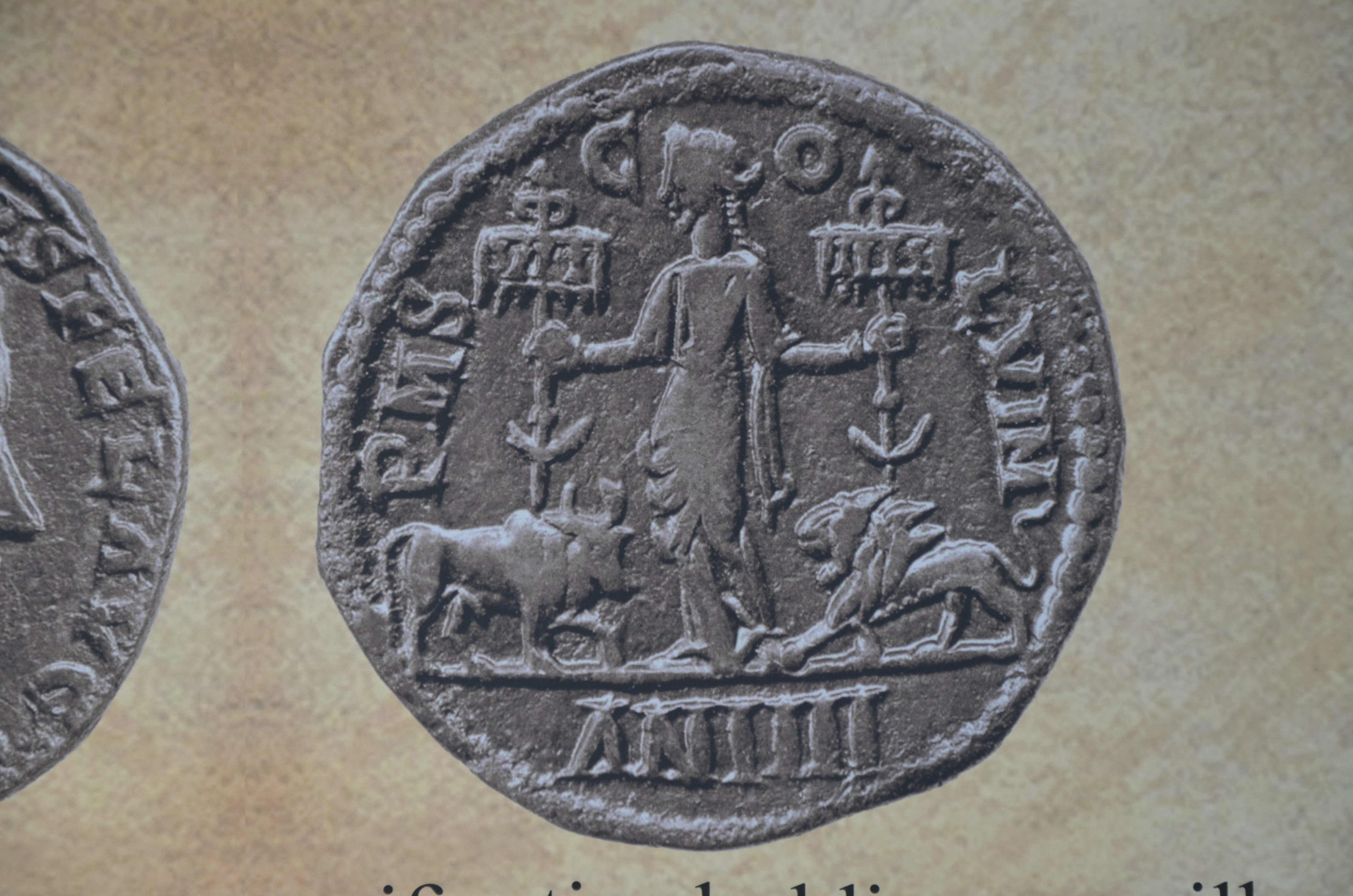 Viminacium, Moesia Superior, Serbia